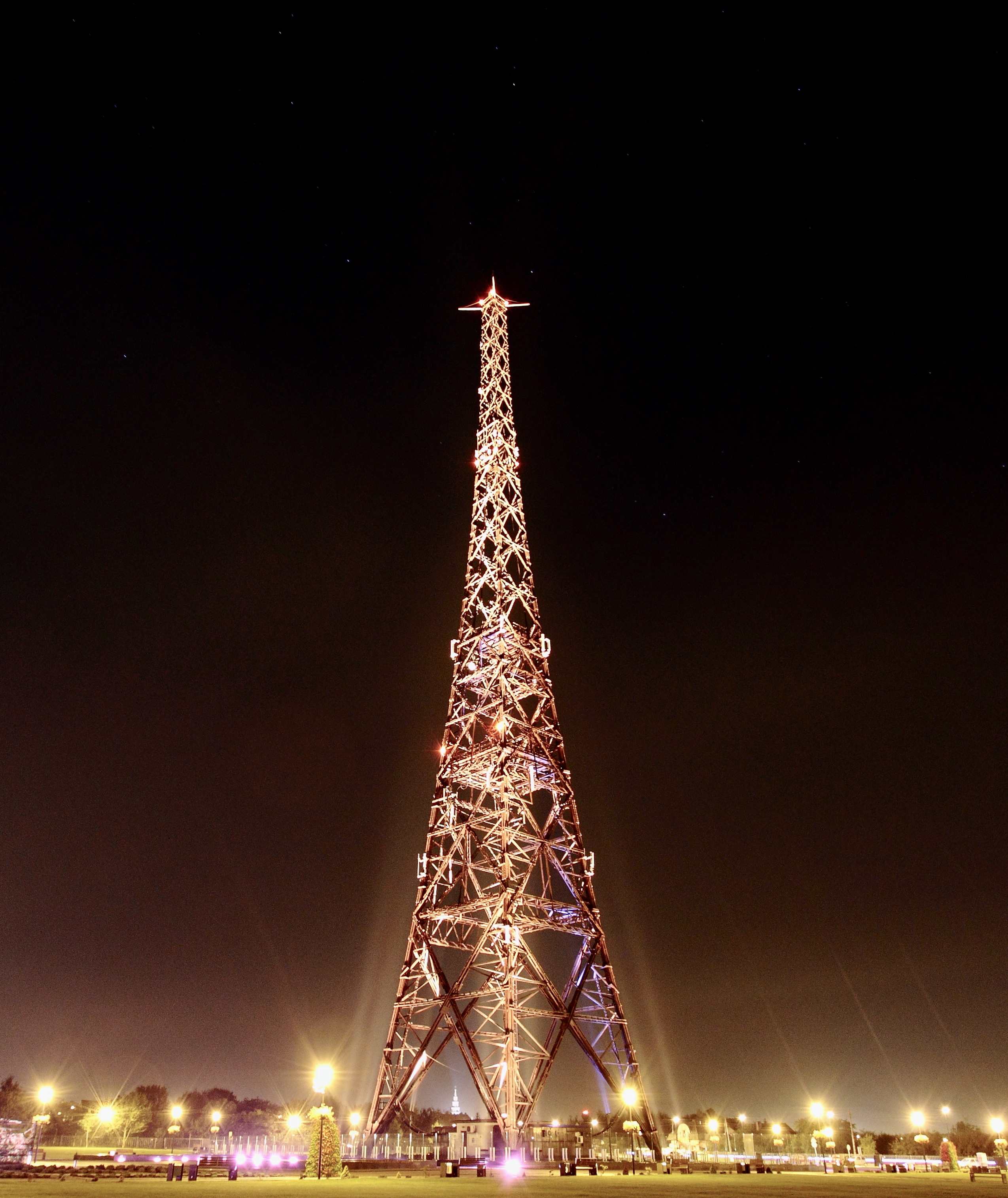 Radiostacja Gliwice to jeden z najbardziej rozpoznawalnych obiektów Gliwic. Charakterystyczna wieża antenowa stanowi część zbudowanego w połowie lat trzydziestych XX wieku kompleksu radiowej stacji nadawczej.